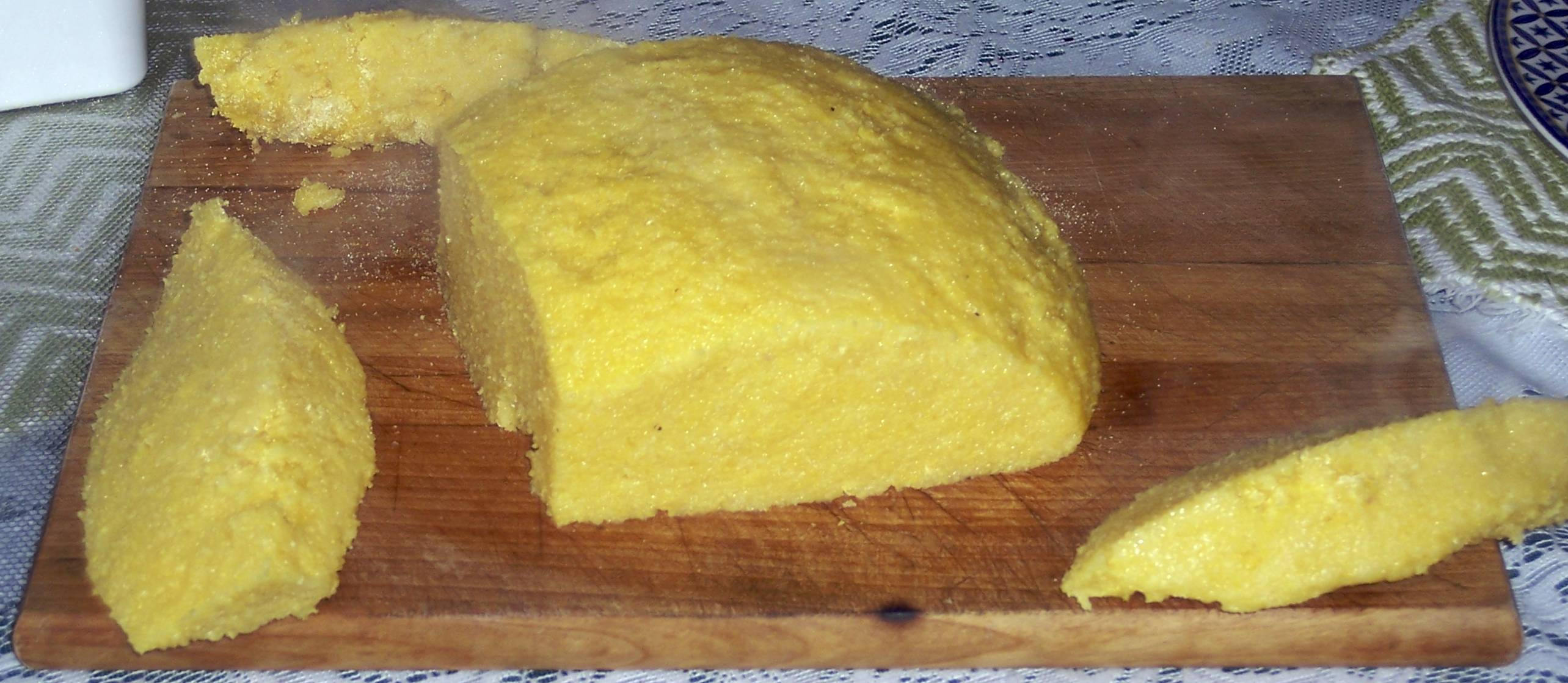 Mamaliga, Romanian dish